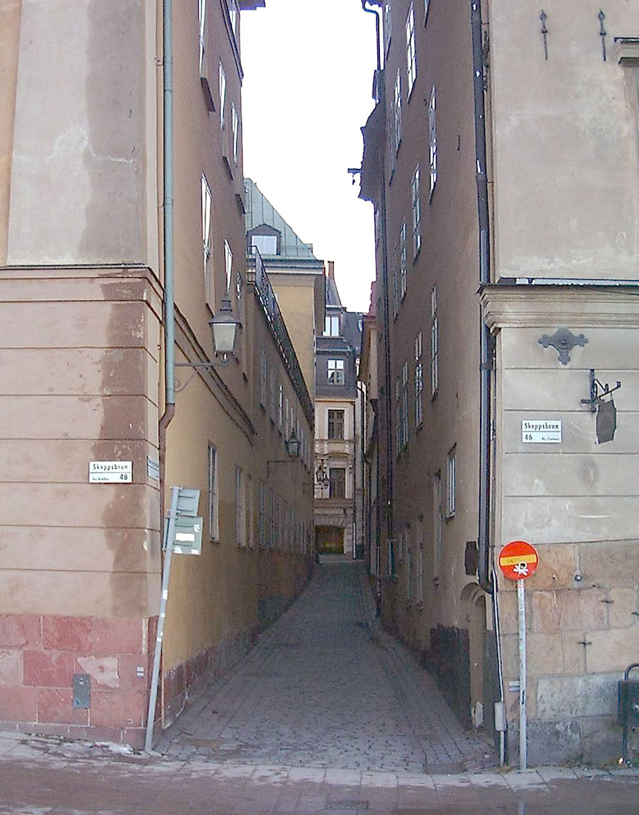 Södra Dryckesgränd in Gamla stan, Stockholm